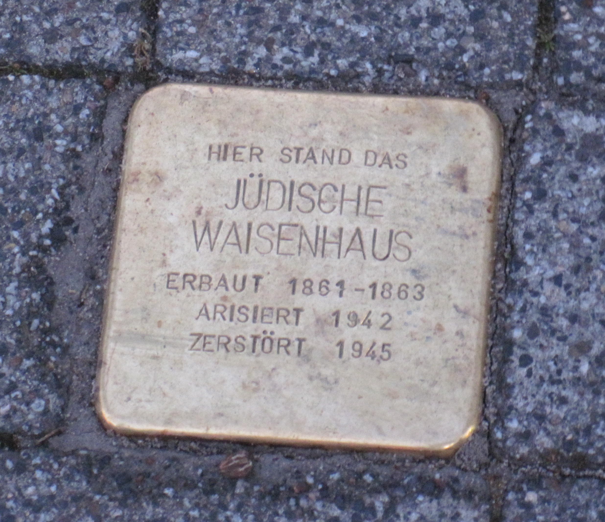 Stolperstein Jüdisches Waisenhaus in Paderborn